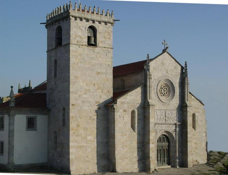 Igreja Matriz de Caminha, Concelho de Caminha, Distrito de Viana do Castelo, Portugal